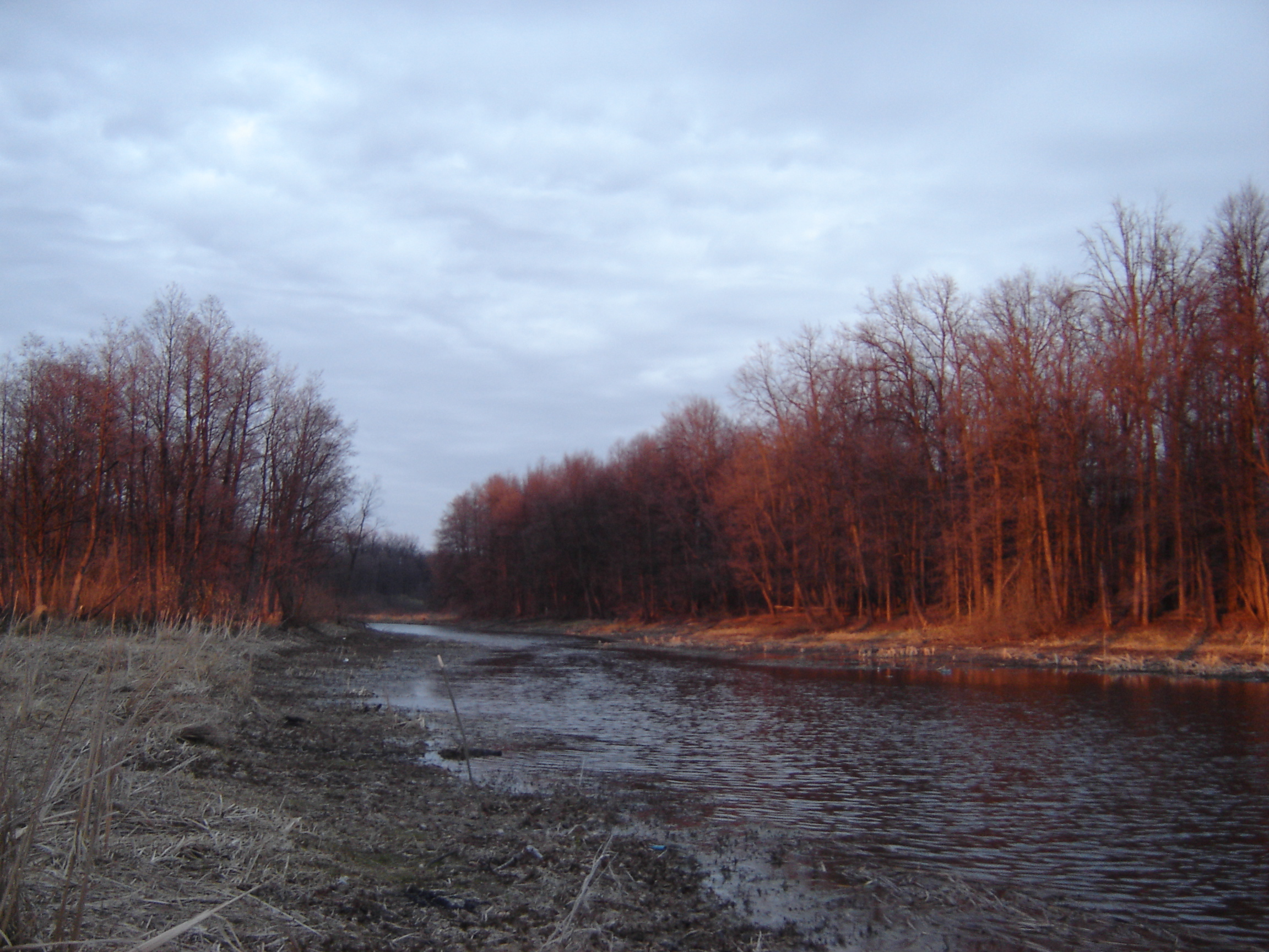 Демский заказник: Уфимский район, Башкортостан This image is related to the protected area of Russia number 0210219